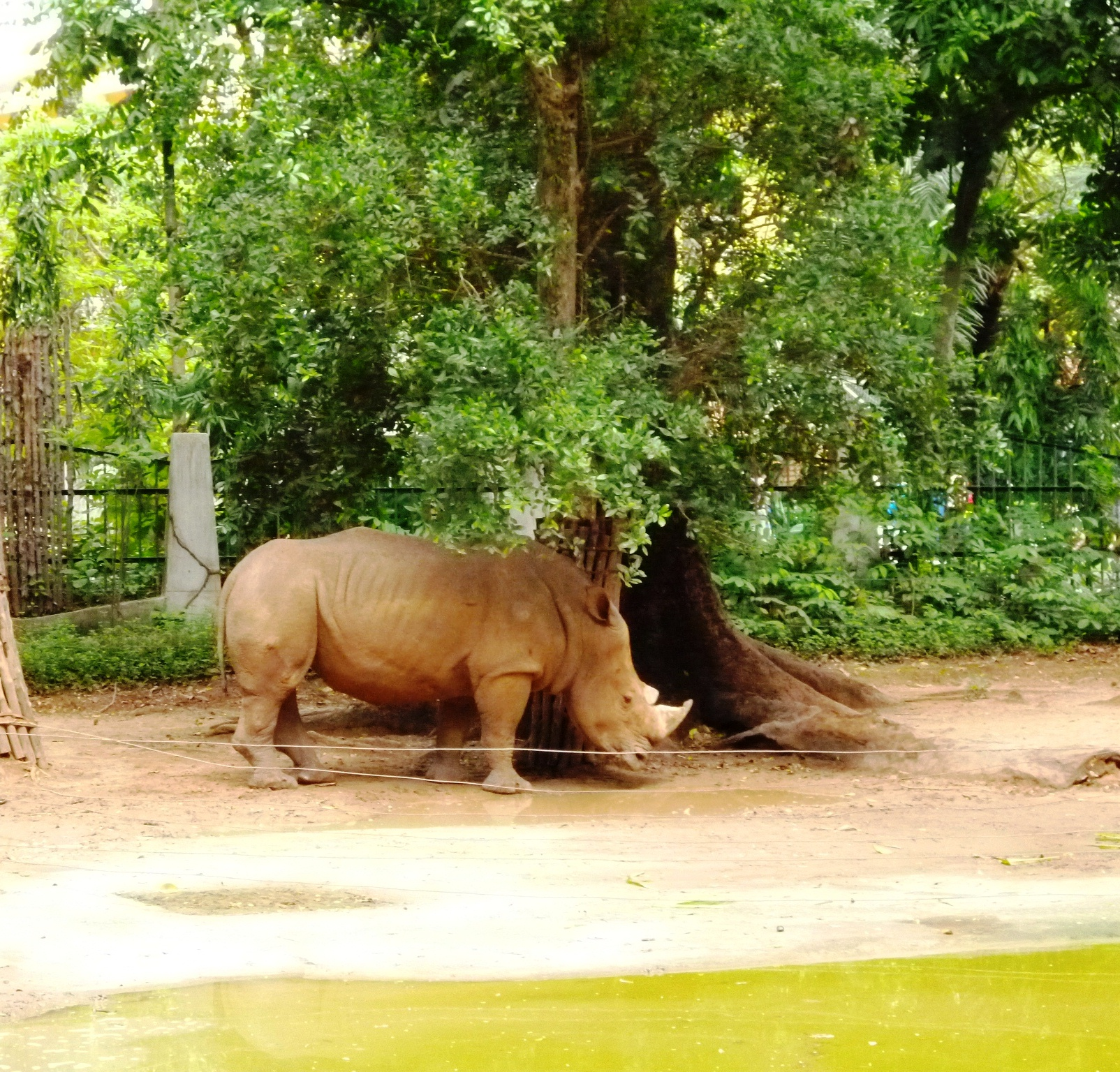 Tê giác tại Sở thú